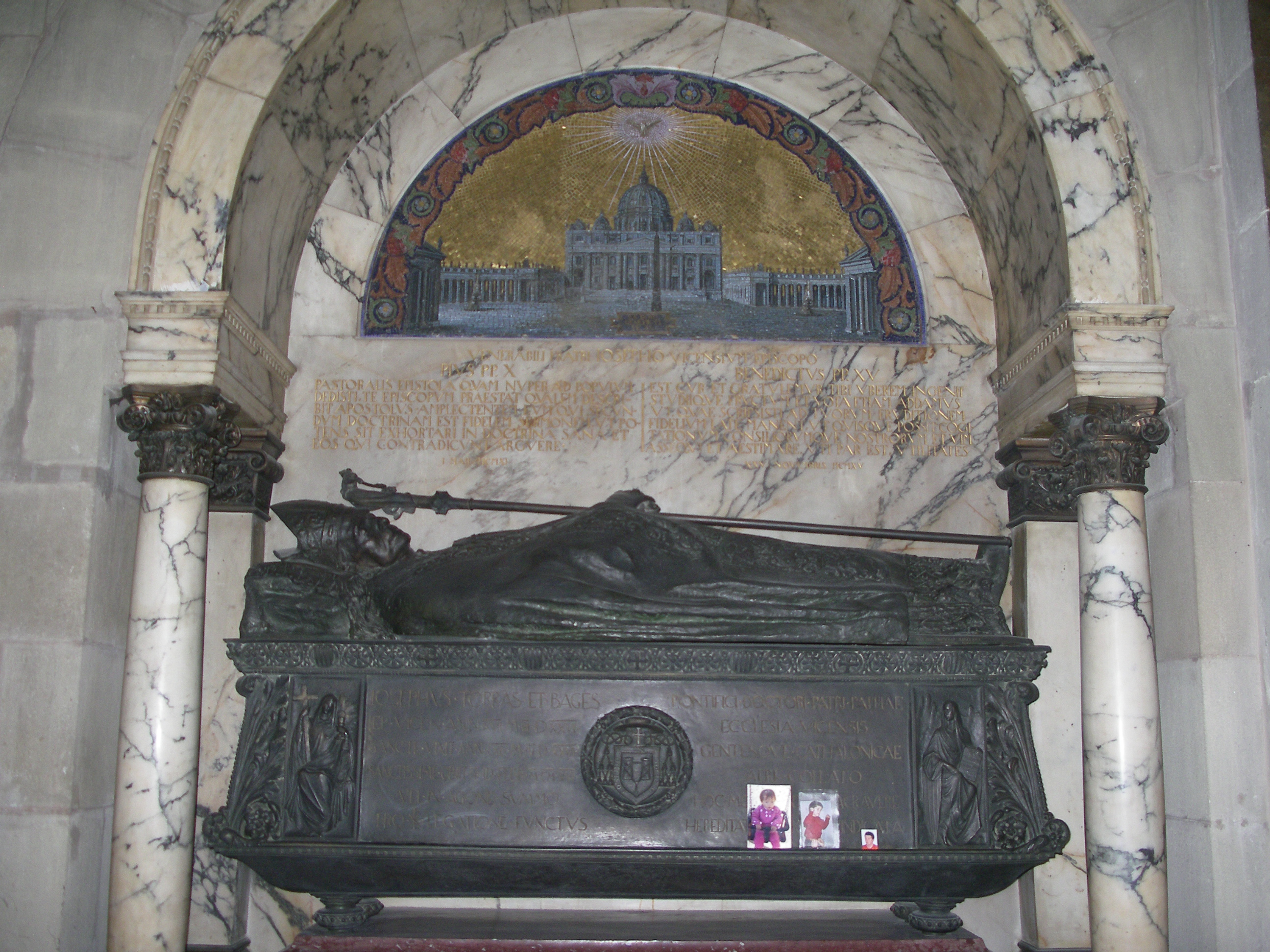 Sepulcro de Josep Torras i Bages en la Catedral de Vic, ca. 1880